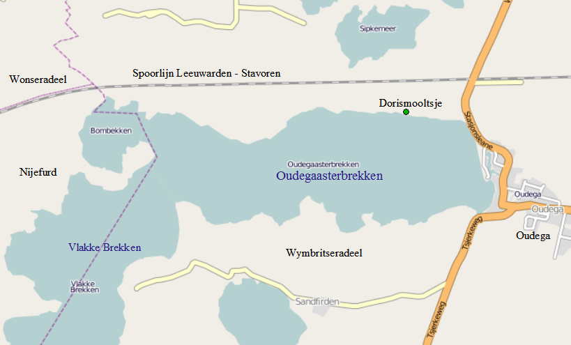 Oudegaasterbrekken, een meer in Friesland.